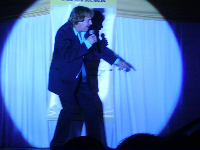 Peter Mociulski von Remenyk más conocido como Peter Rock (Viena, 3 de septiembre de 1945) cantante chileno de origen austriaco, llamado "el faraón del rock".